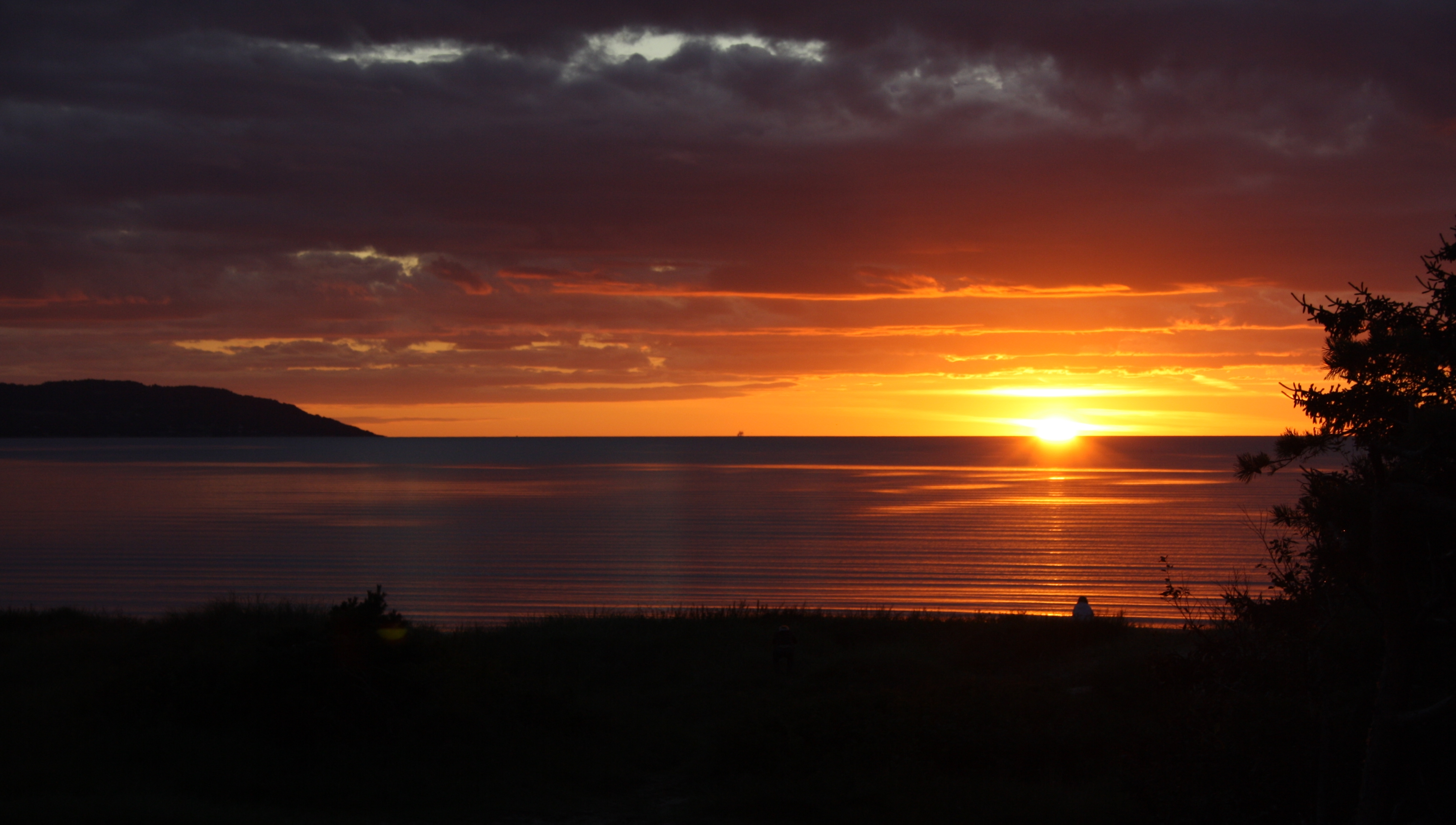 Solnedgång över Laholmsbukten, Sverige, augusti 2011. Vy från Hemmeslöv.